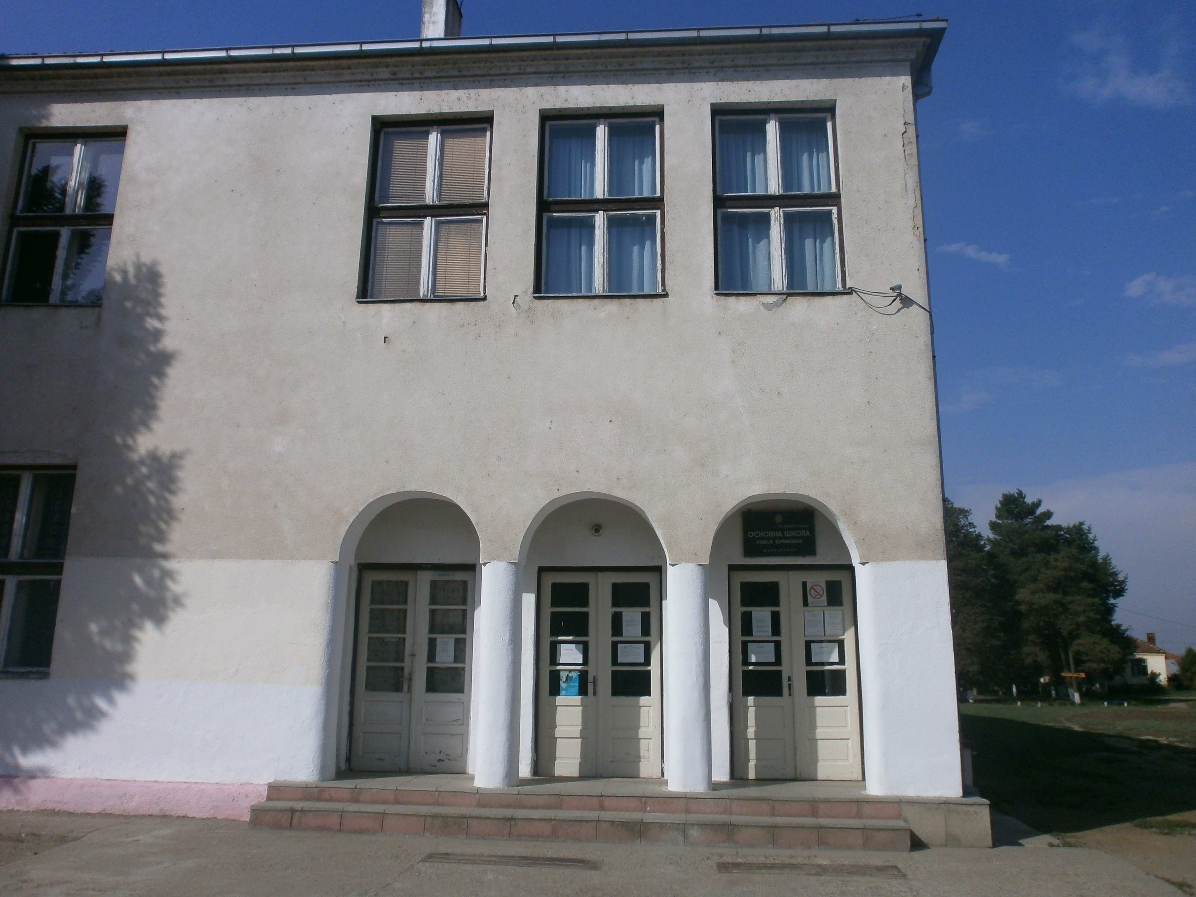 Srpski (latinica): Manojlovce, Leskovac